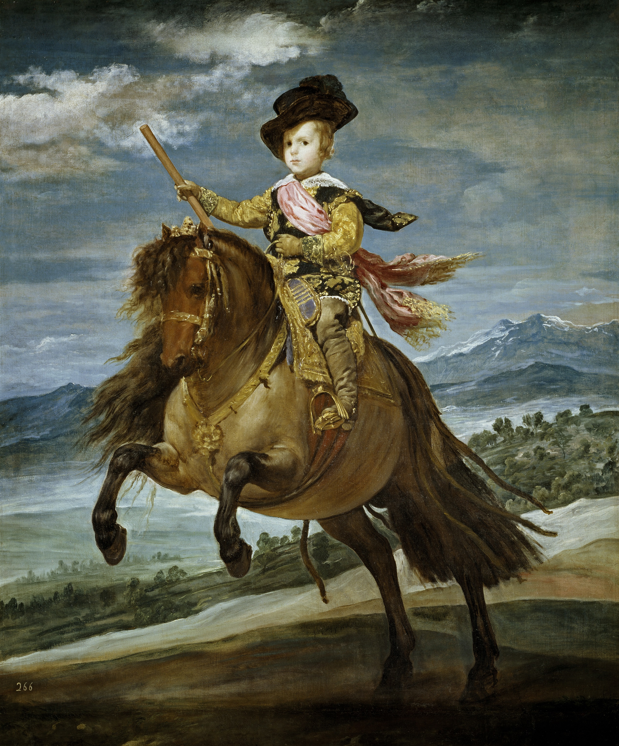 Retrato ecuestre del príncipe Baltasar Carlos de Austria (1629-1646), que fue hijo del rey Felipe IV de España y de la reina Isabel de Borbón.